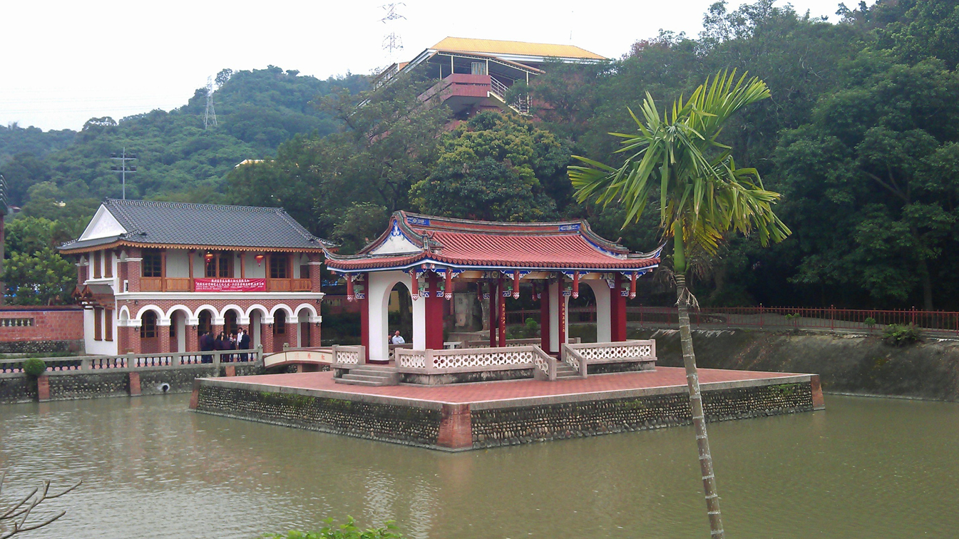 霧峰林家萊園